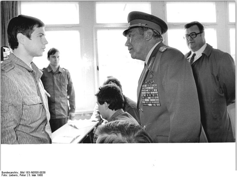 Gera, Hoffmann, Böhme ADN-ZB Liebers-5.5.80 Gera: Über Ergebnisse der wehrpolitischen Erziehung an den Hoch- und Fachschulen der DDR überzeugten sich Armeegeneral Heinz Hoffmann (2.v.r.), Mitglied des Politbüros des ZK der SED und Minister für Nationale Verteidigung, und Prof. Hans-Joachim Böhme (r.), Minister für Hoch- und Fachschulwesen, in der Ausbildungseinrichtung "Peter Göring". Hier besichtigten die Gäste u.a.Lehrkabinette.